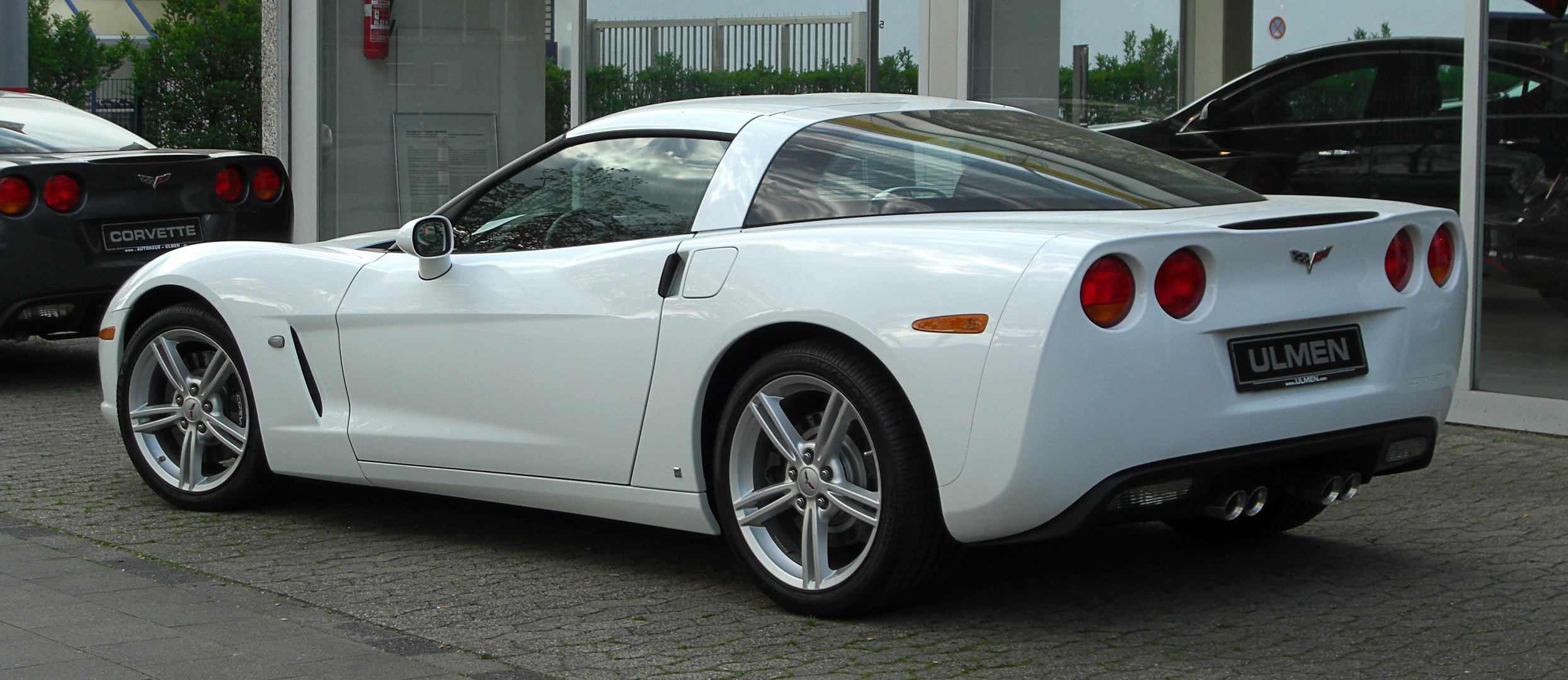 Chevrolet Corvette Coupé Luxury (C6)